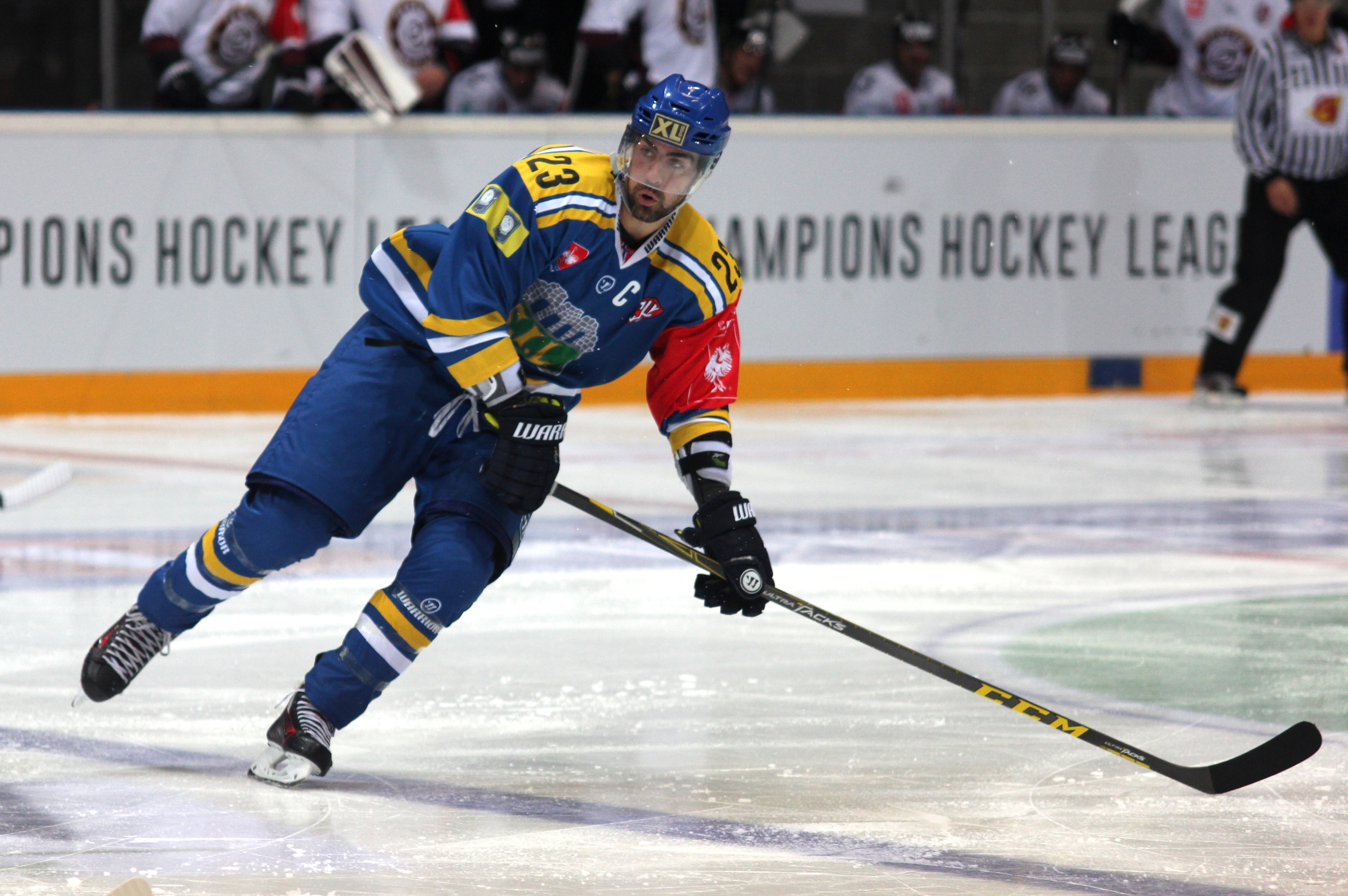 Christian Larrivée (H 23).